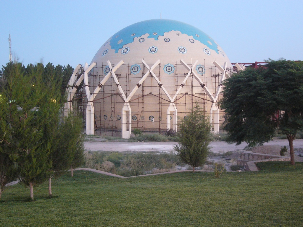 افلاک نمای نیشابور